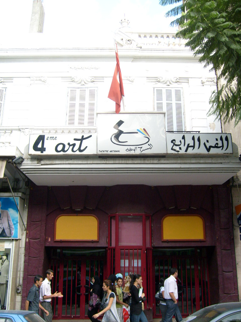 Salle Quatrième art dépendant du théâtre national tunisien sur l'avenue de Paris à Tunis